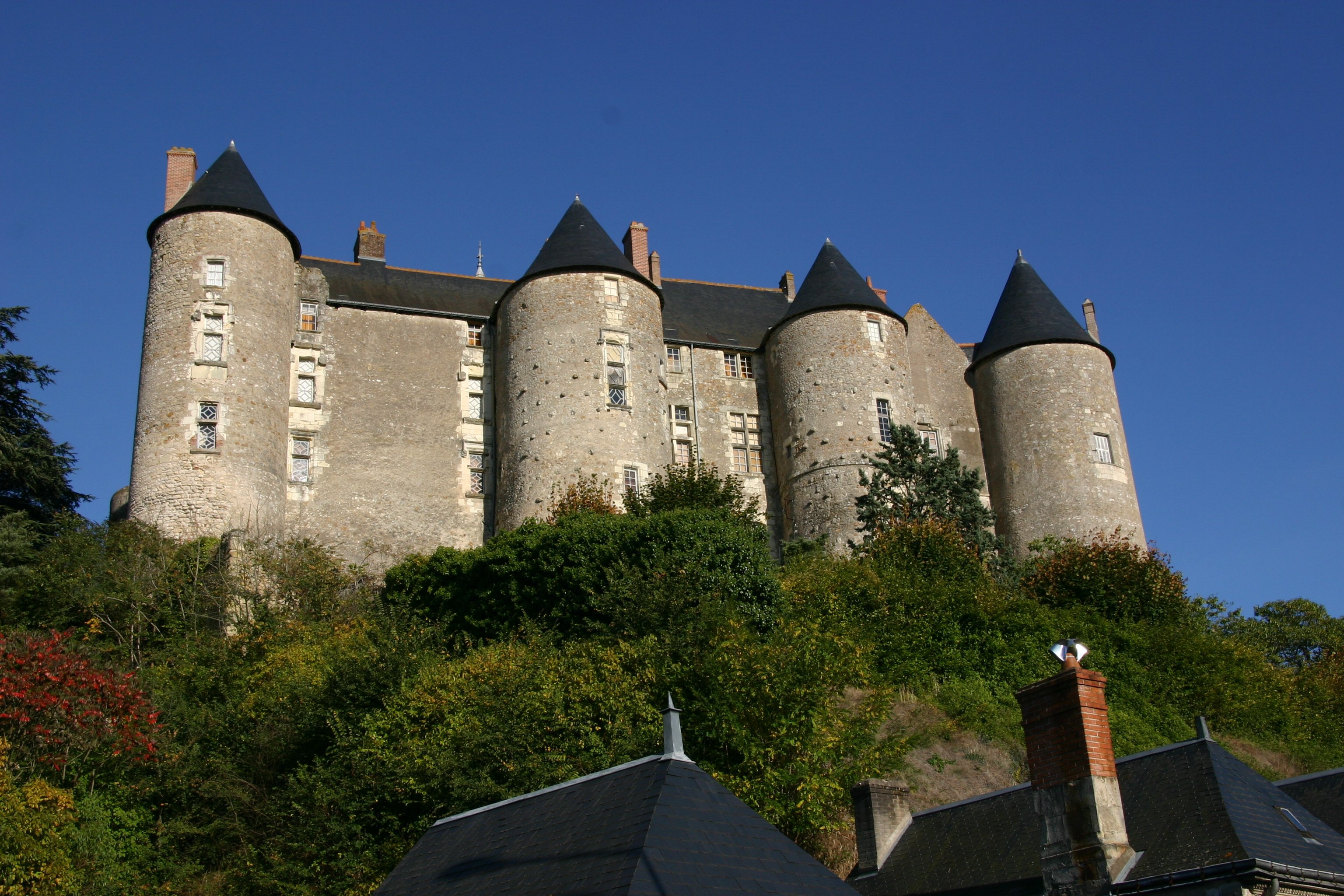 Schloss Luynes